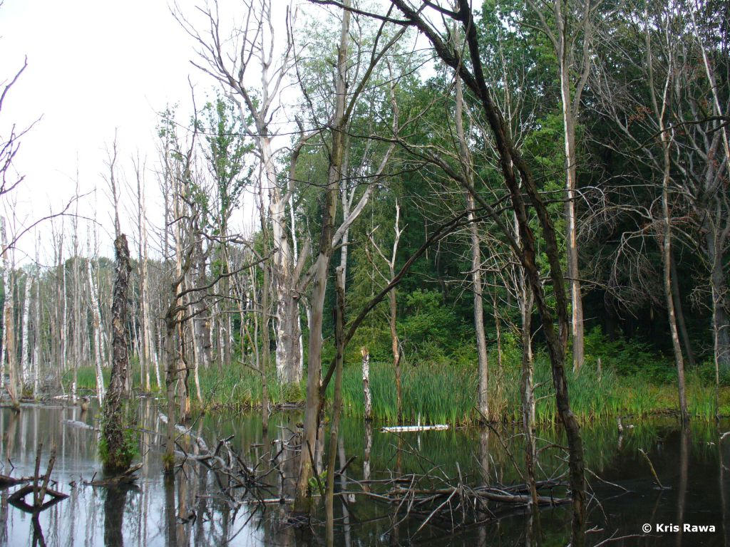 Uroczysko Buczyna